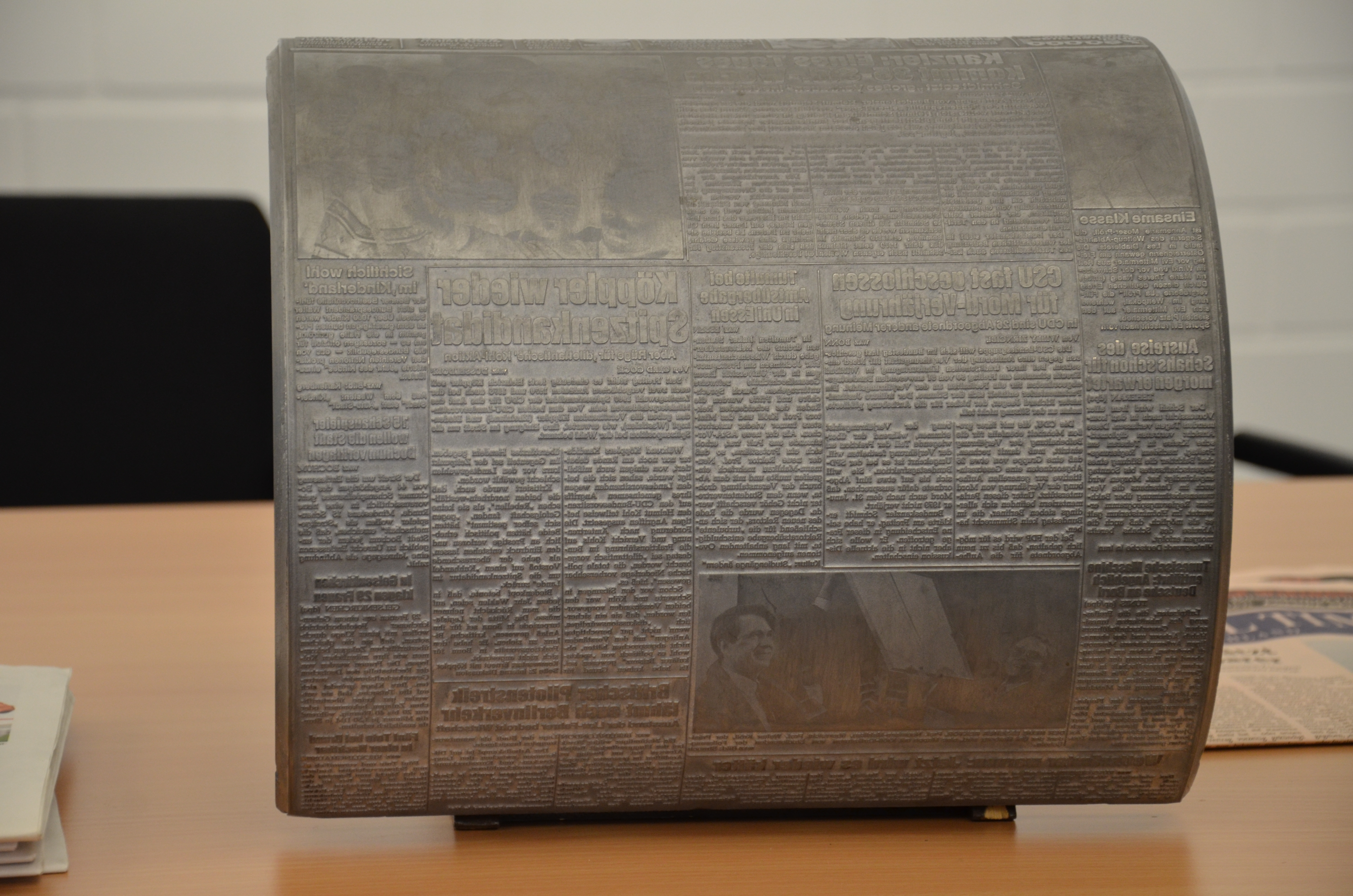 Druckhaus der WAZ Mediengruppe in Essen. Alte Druckplatte des hier nicht mehr genutzten Hochdruckverfahrens.